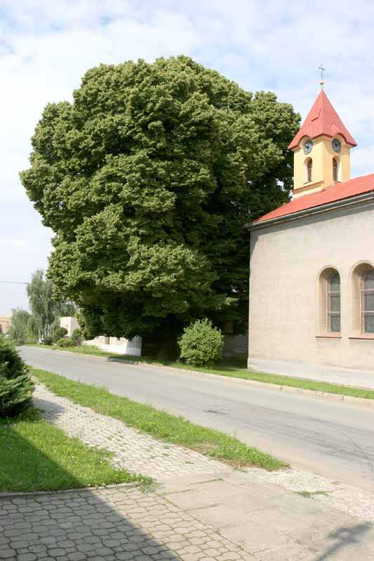 Chyťasek